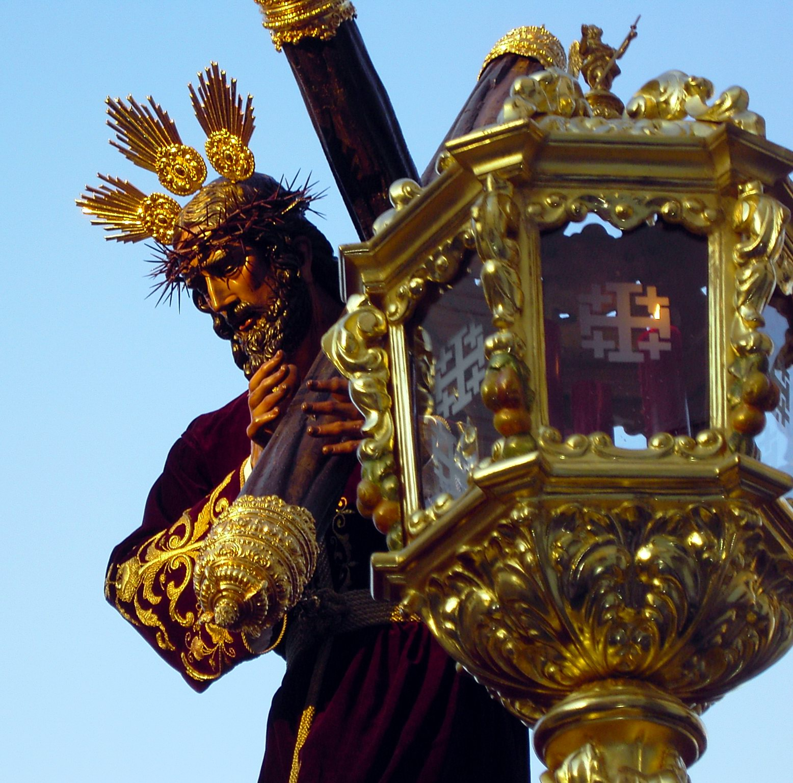 Cristo de Pasión Huelva